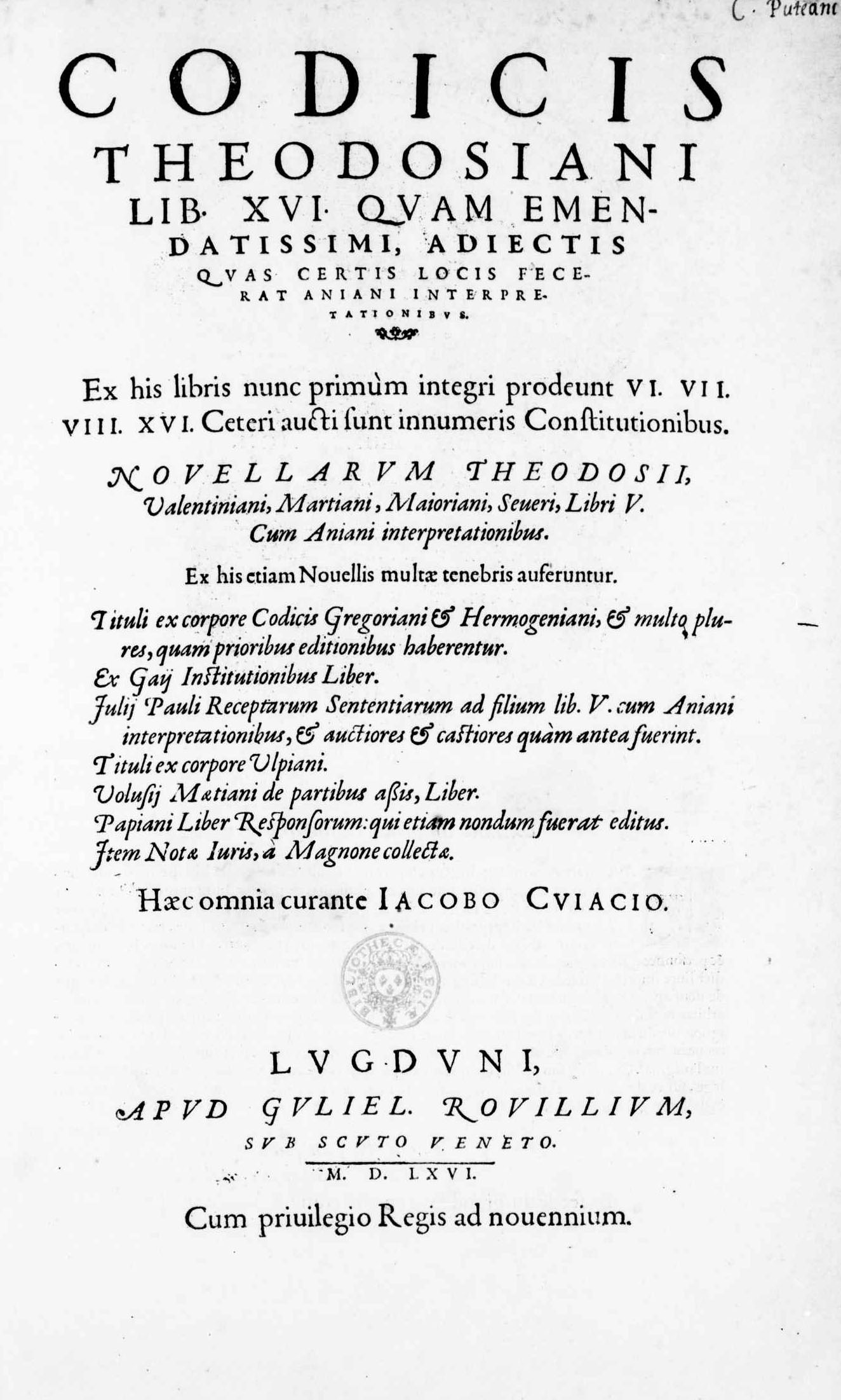 Frontespizio